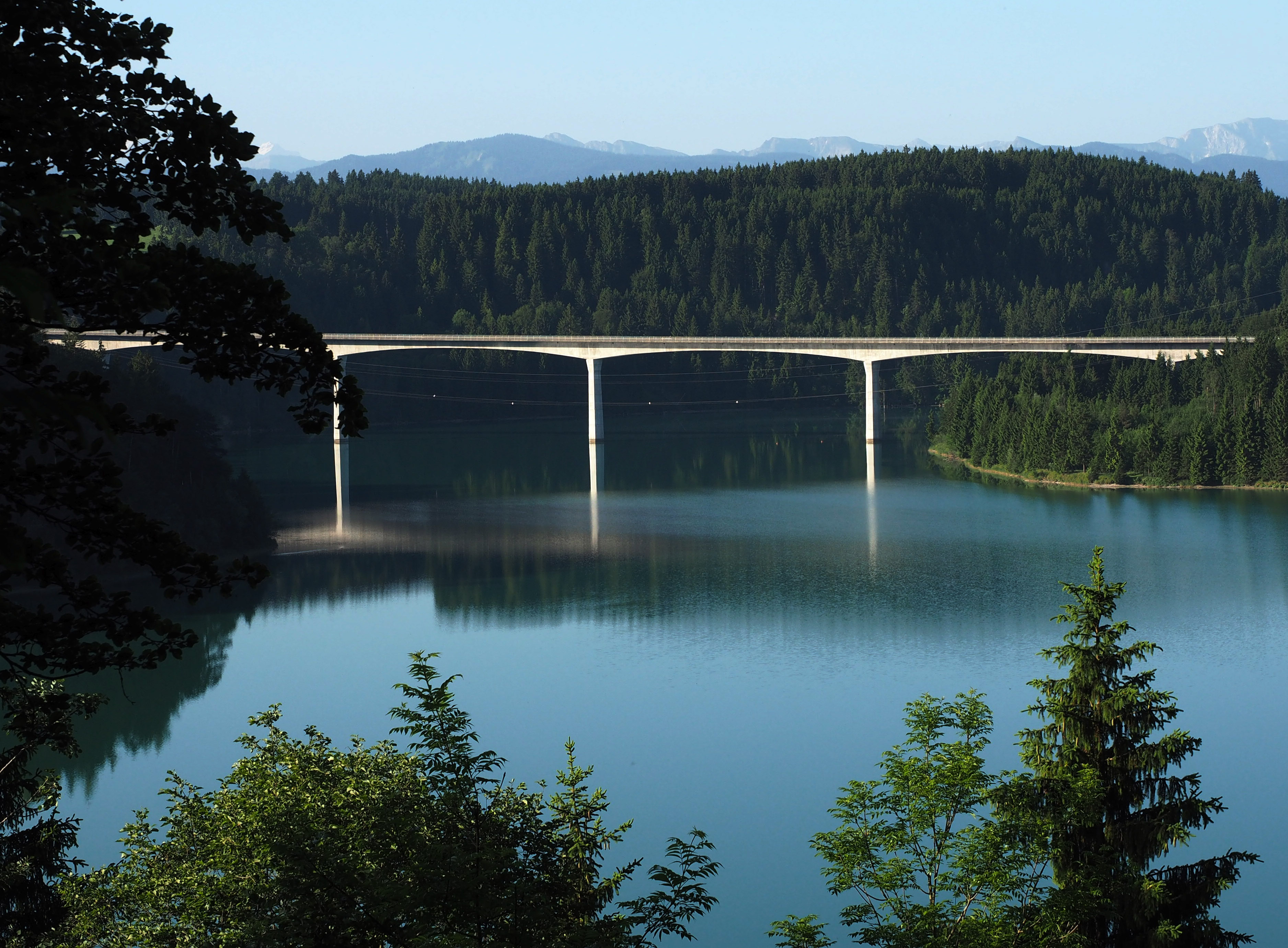 Lechtalbrücke (Schongau) von Norden im Licht der morgendlichen Junisonne